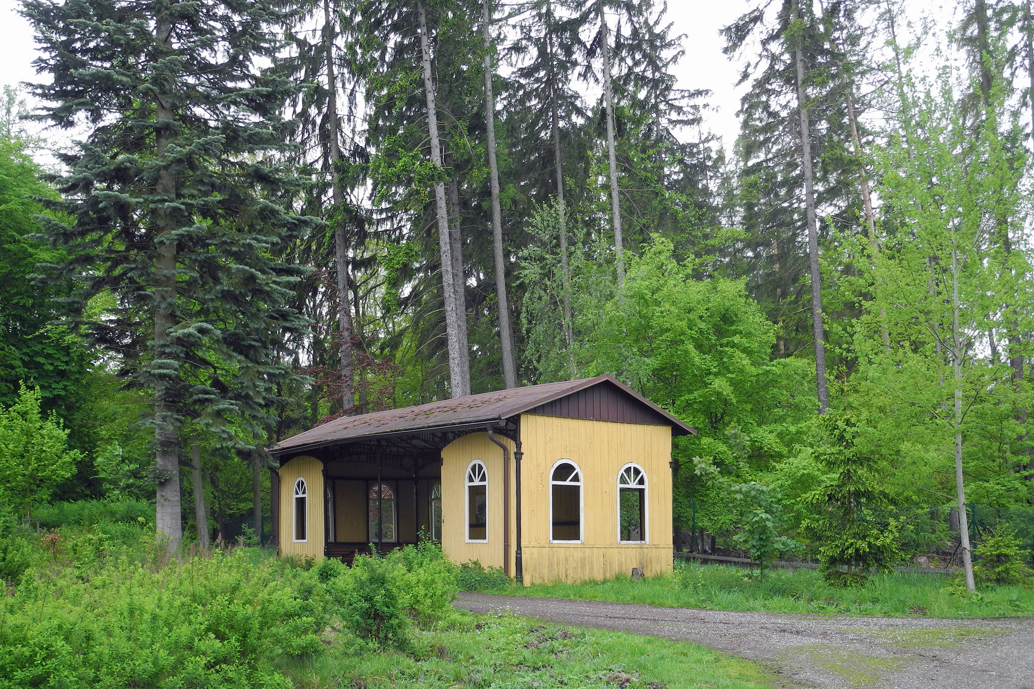 Fibich-Pavillon am Forsthaus Diana im Stadtwald von Karlsbad (Karlovy Vary)